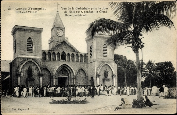 Cathédrale de Brazzaville pendant la grand-messe du jour de Noël.